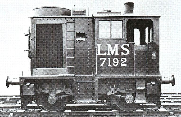 Sentinel-Lokomotive Nr. 7192 der LMS mit Doble-Hochdruckkessel